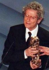 Darry Cowl à la cérémonie des césars